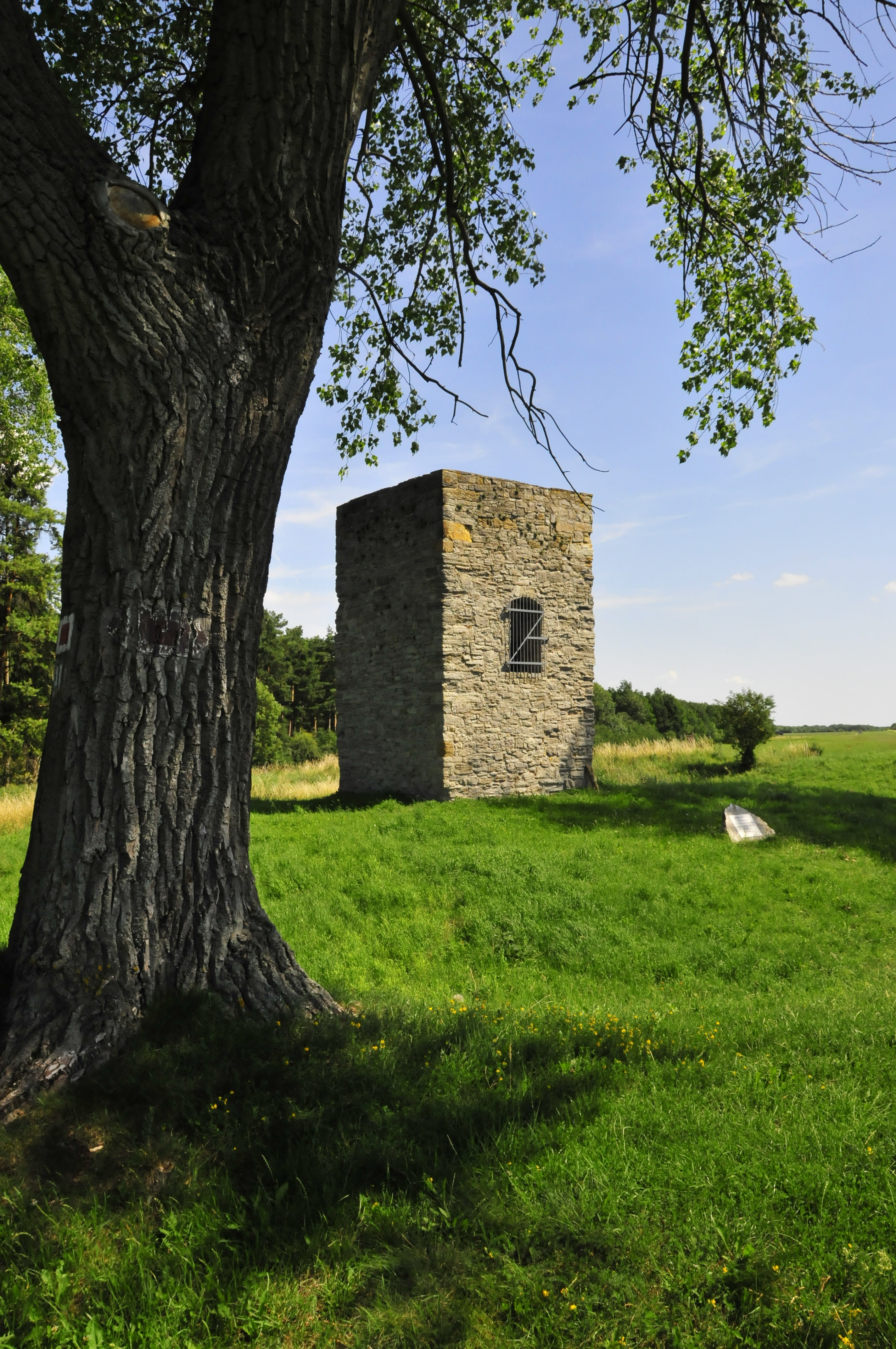 Mirador de Bienstädt